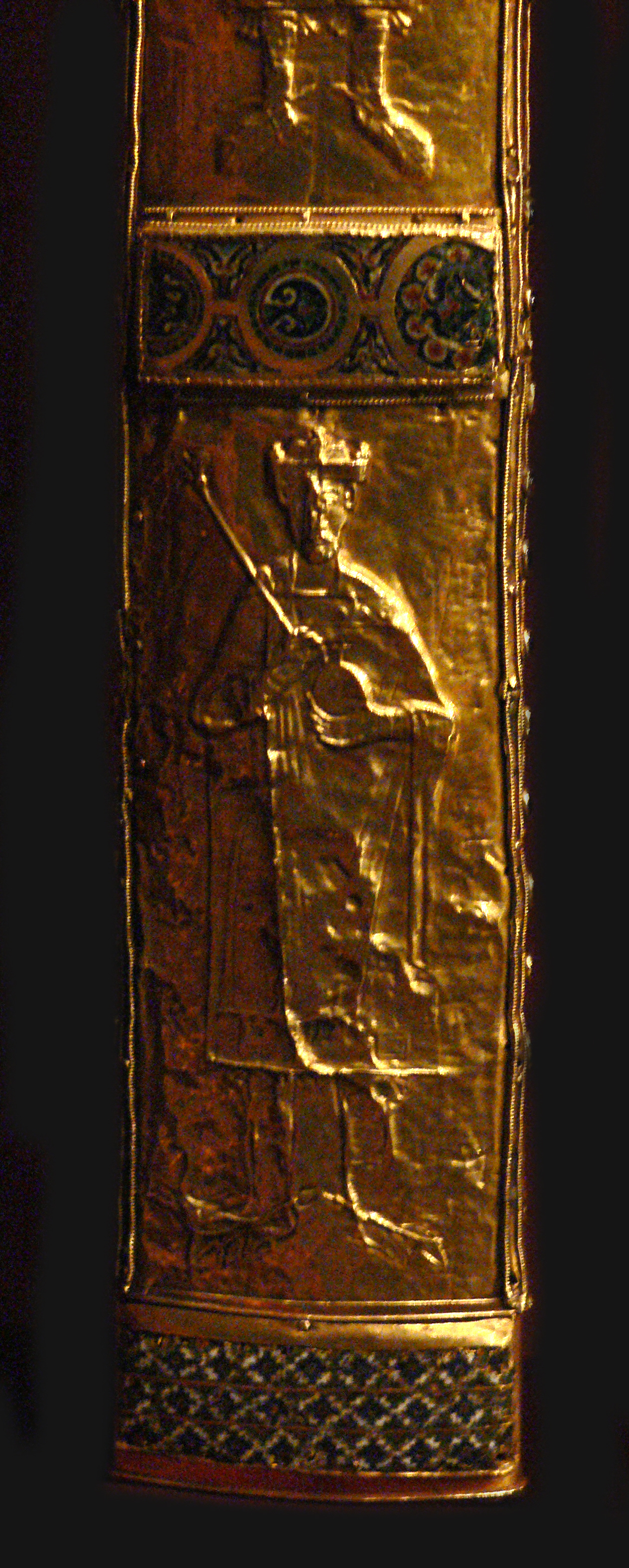 Reichsschwert des hl. römischen Reichs; Wien, Weltliche Schatzkammer Detail Heinrich III. (?)